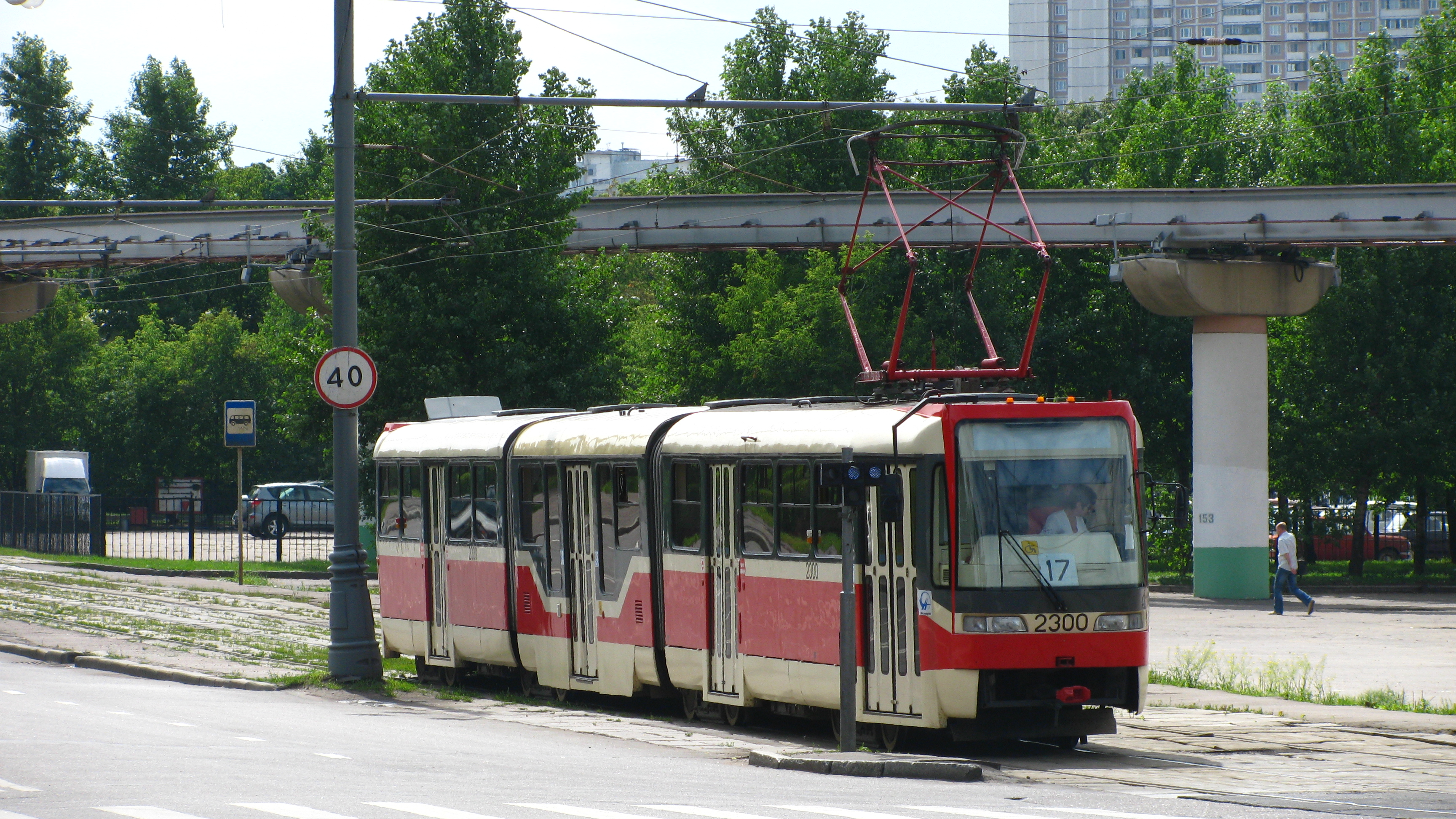 Tatra KT3R 17-го маршрута около остановки «ВДНХ. Северный вход».